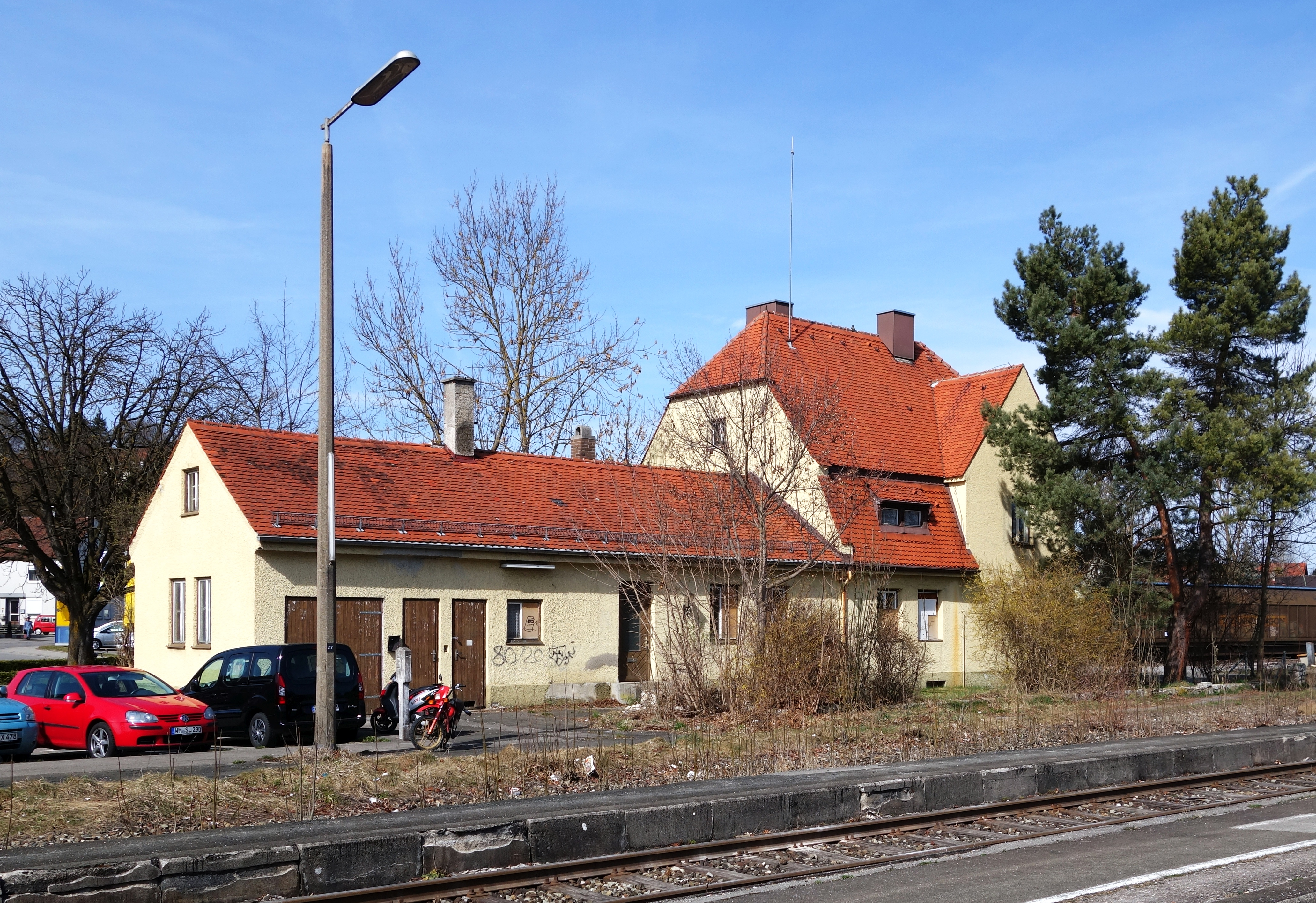 Bahnhof Schongau, ehemaliges Bahnmeisterei-Gebäude von der Gleisseite